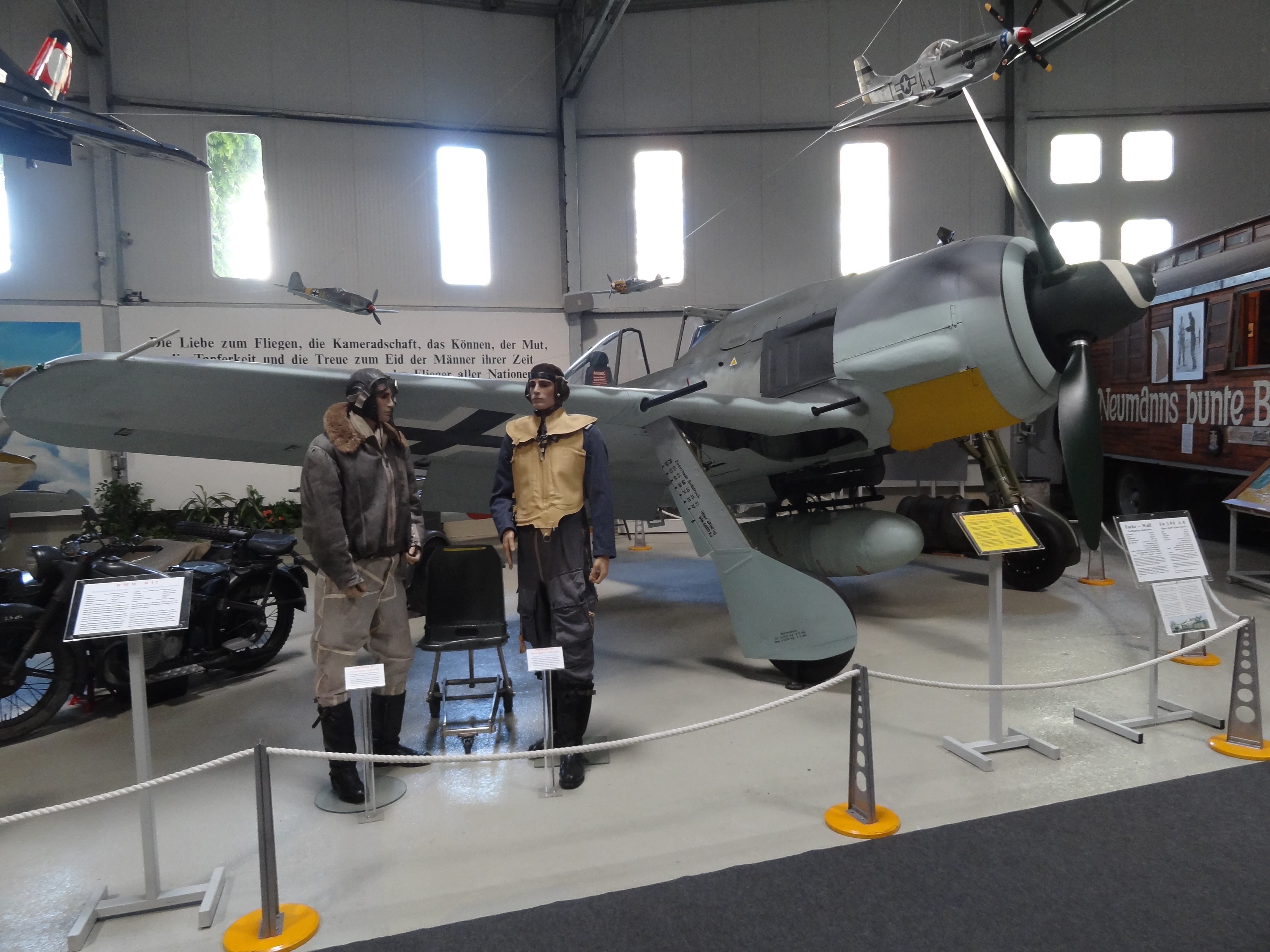 Fw 190 A8, Luftfahrtmuseum Hannover-Laatzen(new producion-FLUG + WERK Fw 190)